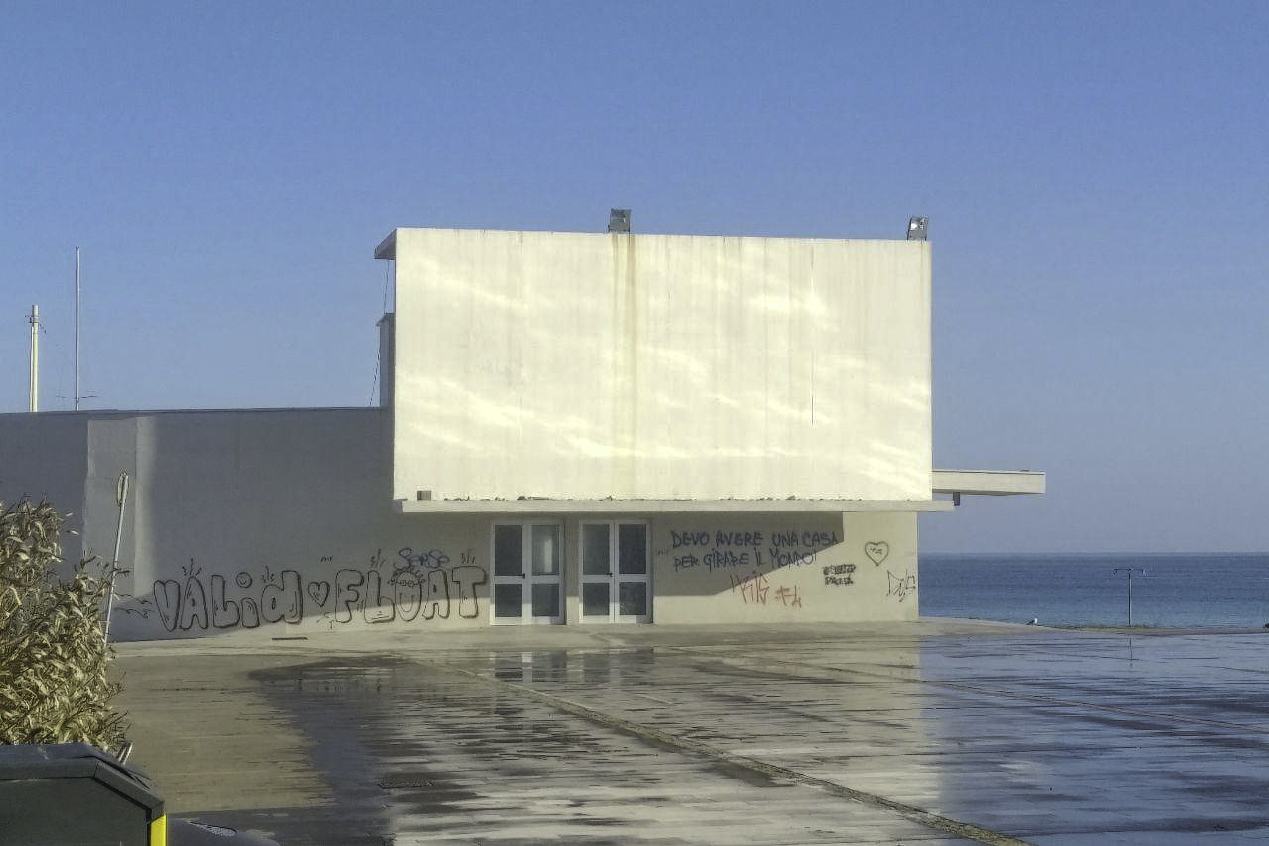 Il centro velico di Porto Torres poche settimane prima del termine del bando pubblico di assegnazione.